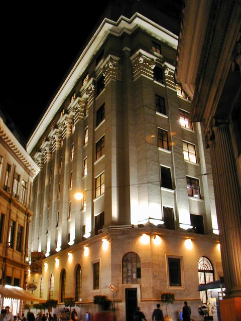 São Paulo Stock Exchange Building